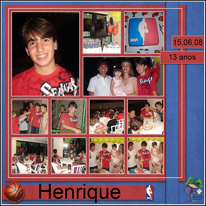 ..: Henrique - 15.06.08 :..